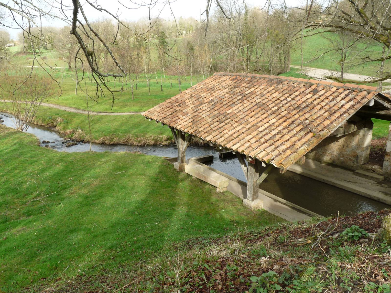 la Bellonne à St-Adjutory, Charente, France